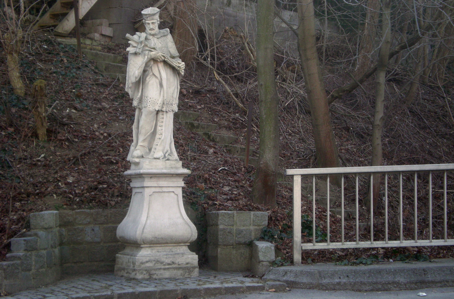 Johannes-Nepomuk-Statue bei der Brücke über den Schreiberbach in Wien-Döbling bei der Kreuzung Kahlenbergstraße / Wildgrubstraße